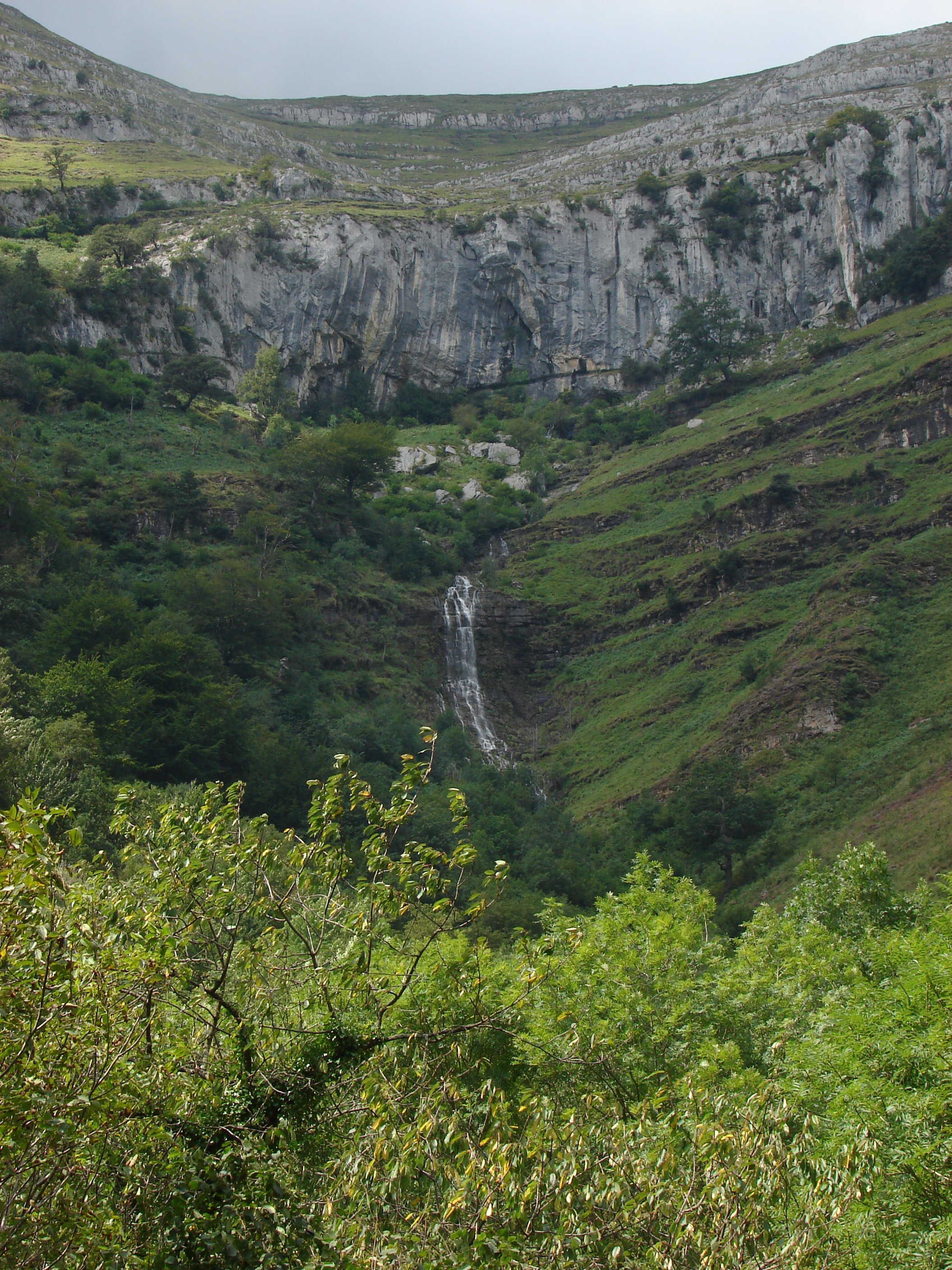 Barranco de Rolacias. Relieve kárstico, Parque Natural Collados del Asón, Cantabria, España